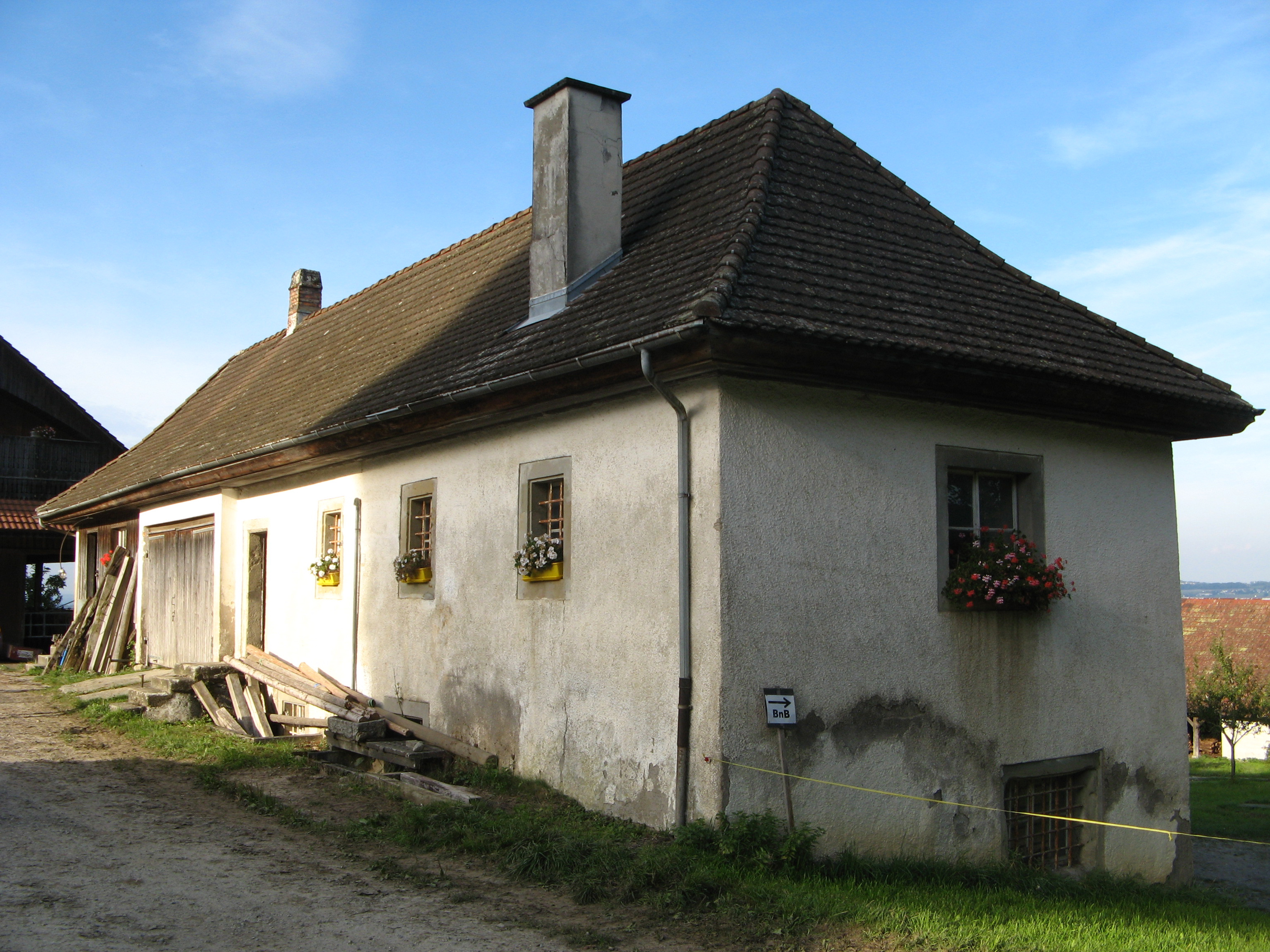 Ökonomiegebäude des Sentenhofes bei Boswil (Baujahr 1540, ehemaliges Käsereigebäude)